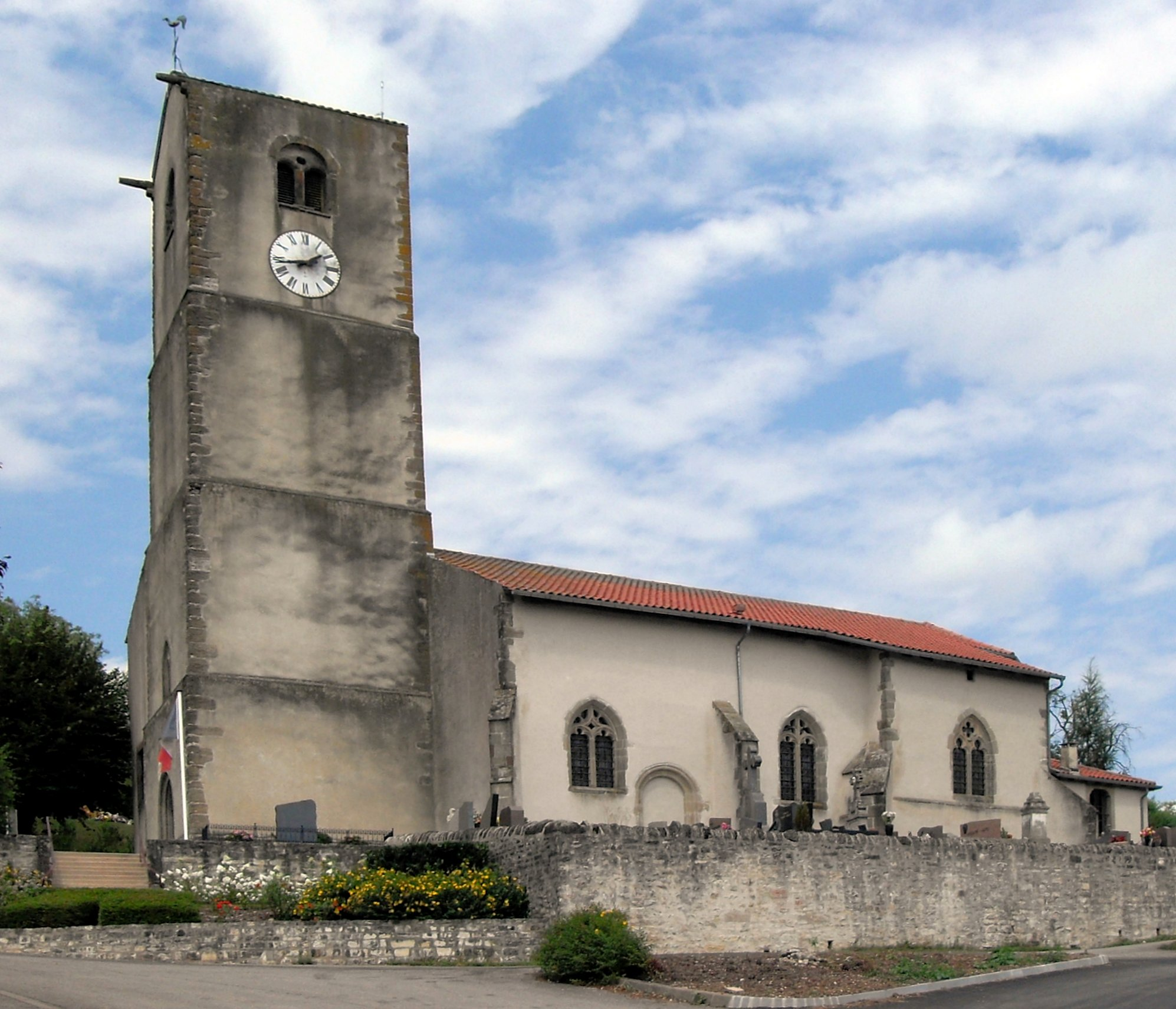 L'église Saint-Barthélemy de Gugney-aux-Aulx